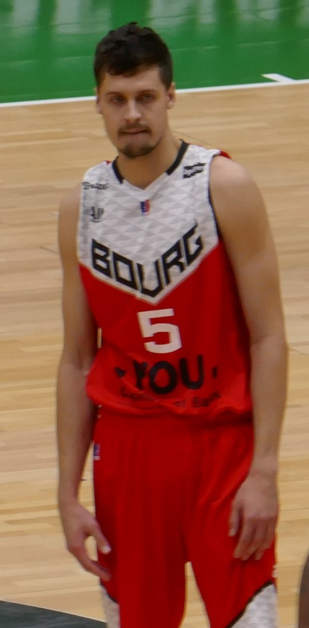 Mathieu Wojciechowski